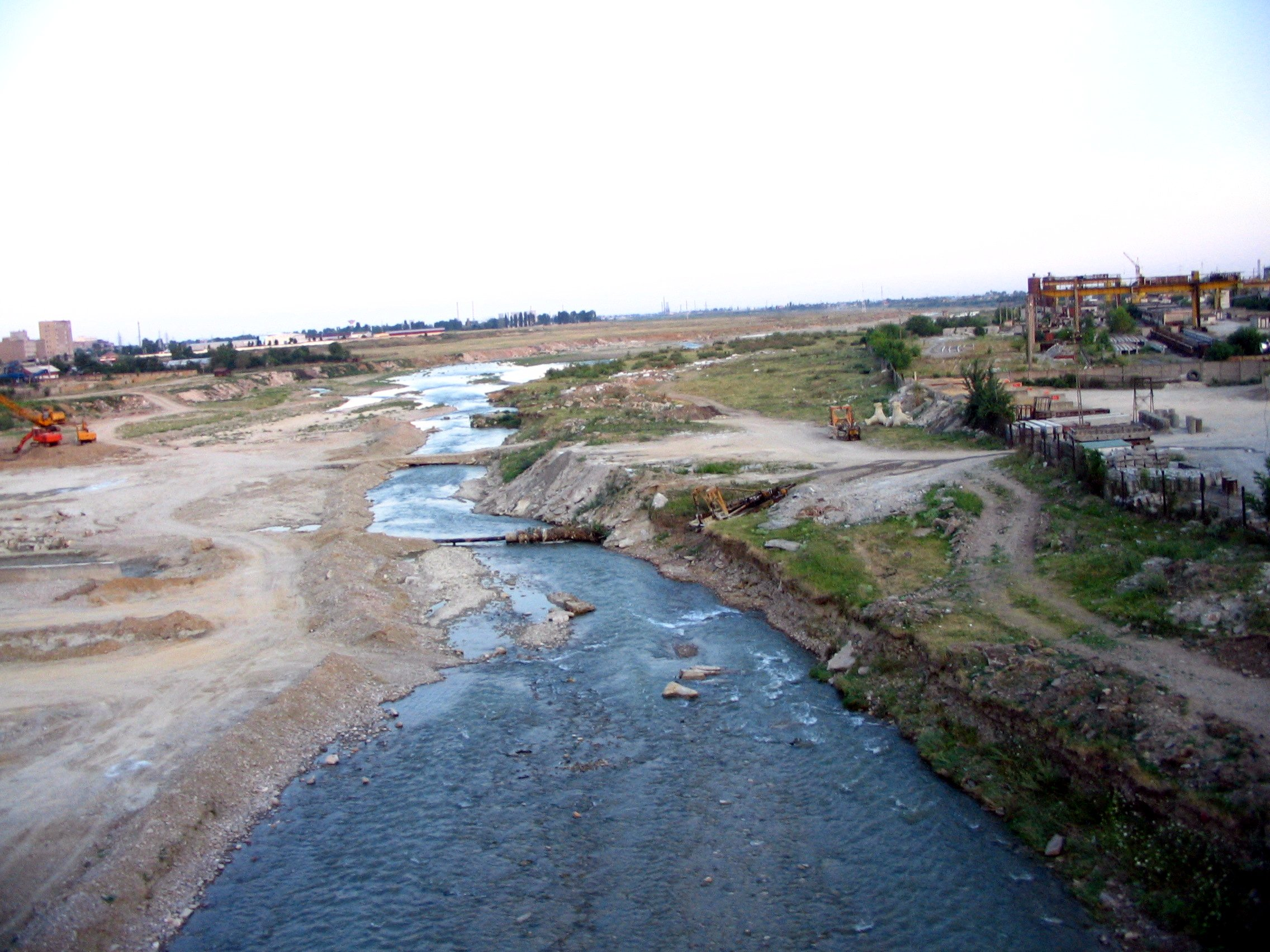 The Teleajen River near Ploieşti, Romania